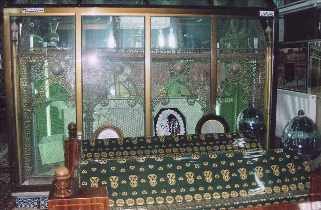 Foto del Maqam de Ibn Arabi en Damasco, Siria, en el barrio de Salahiyya, junto al monte Qasyum.